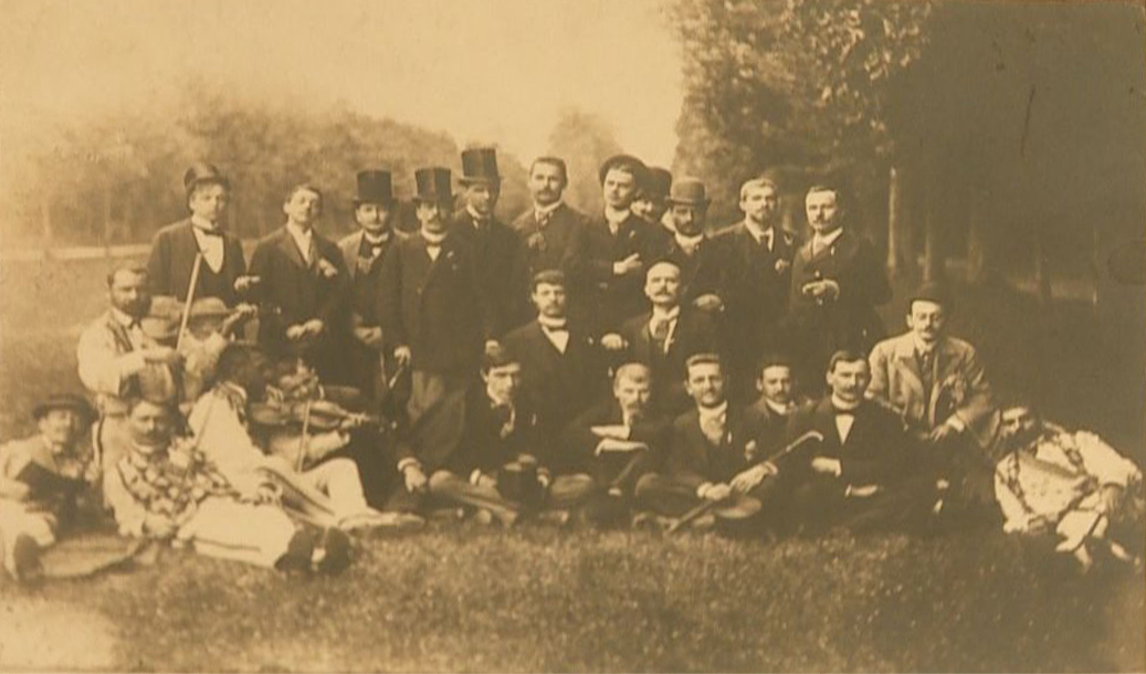 Liga culturală de la Paris. Sărbătoare naționalistă din 3/15 mai 1891 de la St. Cloud (Paris). De la stânga la dreapta: Noica, D. Brătianu, Vicol, Str. Brătianu, Boroș, Mounkton, V. Antonescu, Mihăescu, N. Doleanu (?), Bica, Costinescu, Ocașianu, Comșa, Luchian, Moțoc, Popovici, Mingopol, Alimănișteanu, Hermeniu